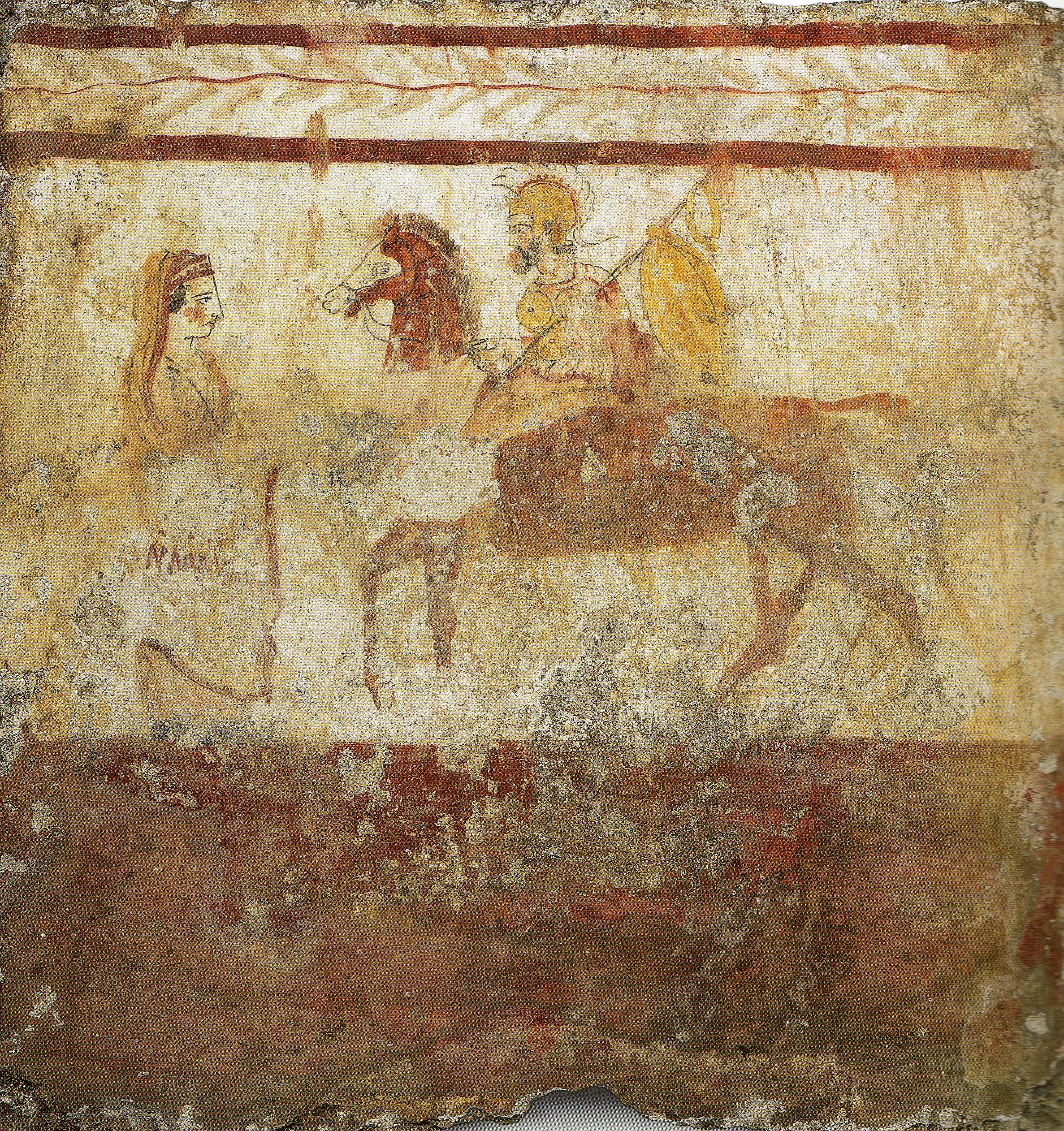 Paestum, Grab des bunten Hahnes. Detail